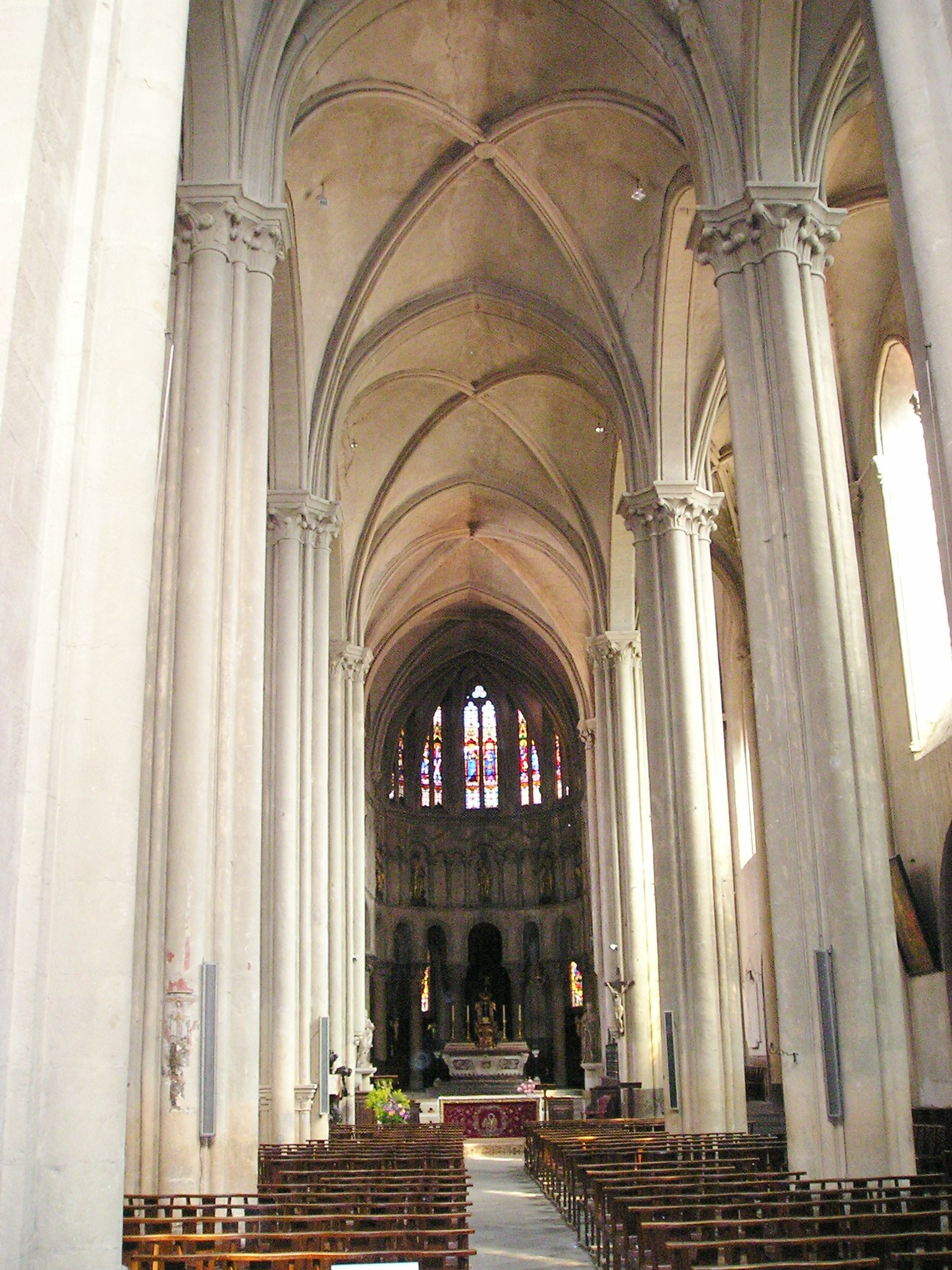 Billom,_Stiftskirche_Saint-Cerneuf